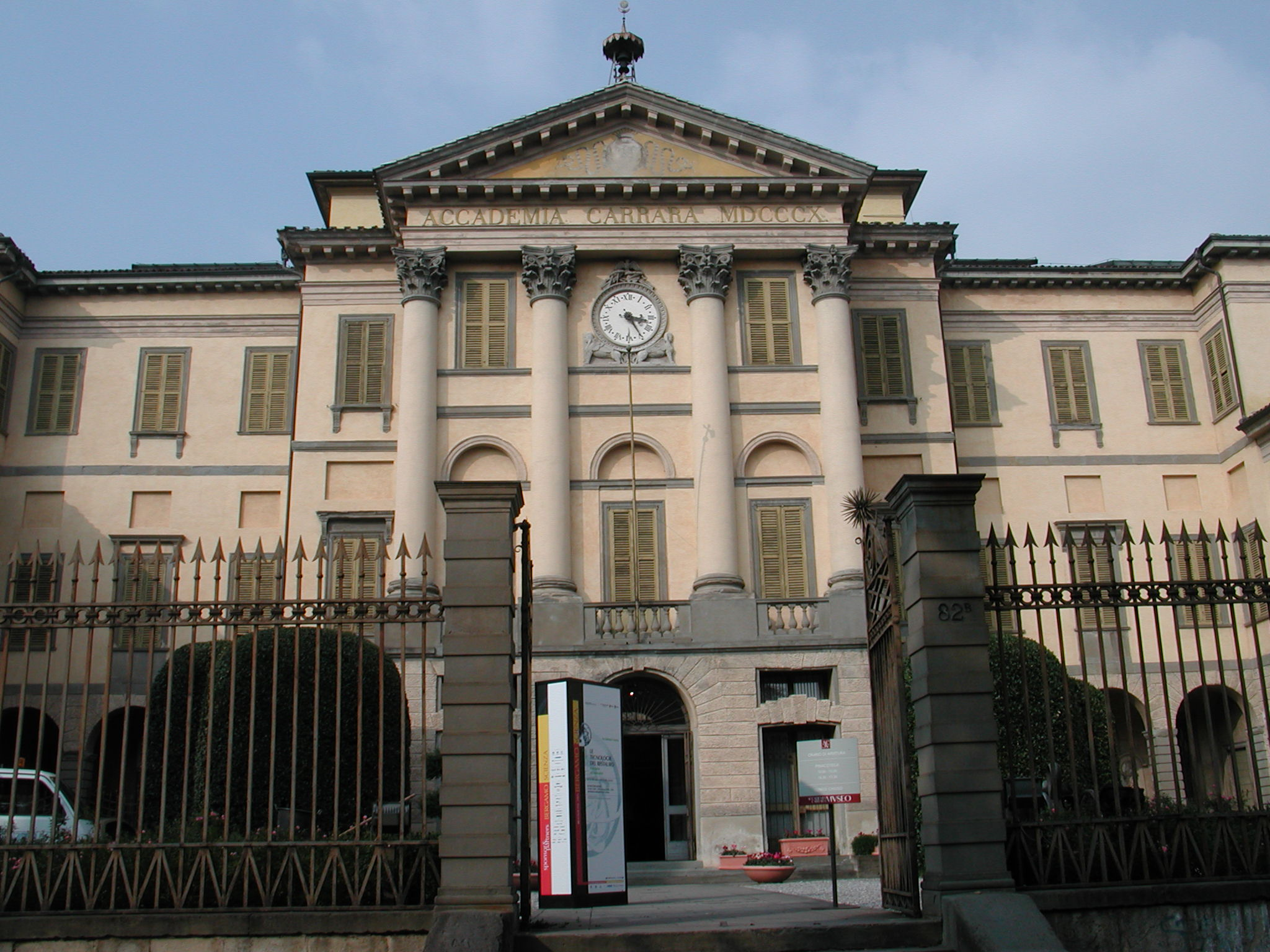 Fachada de la Accademia Carrara Bergamo, Lombardia, Italy accademia carrara fatta da ne, made by me, october 2005